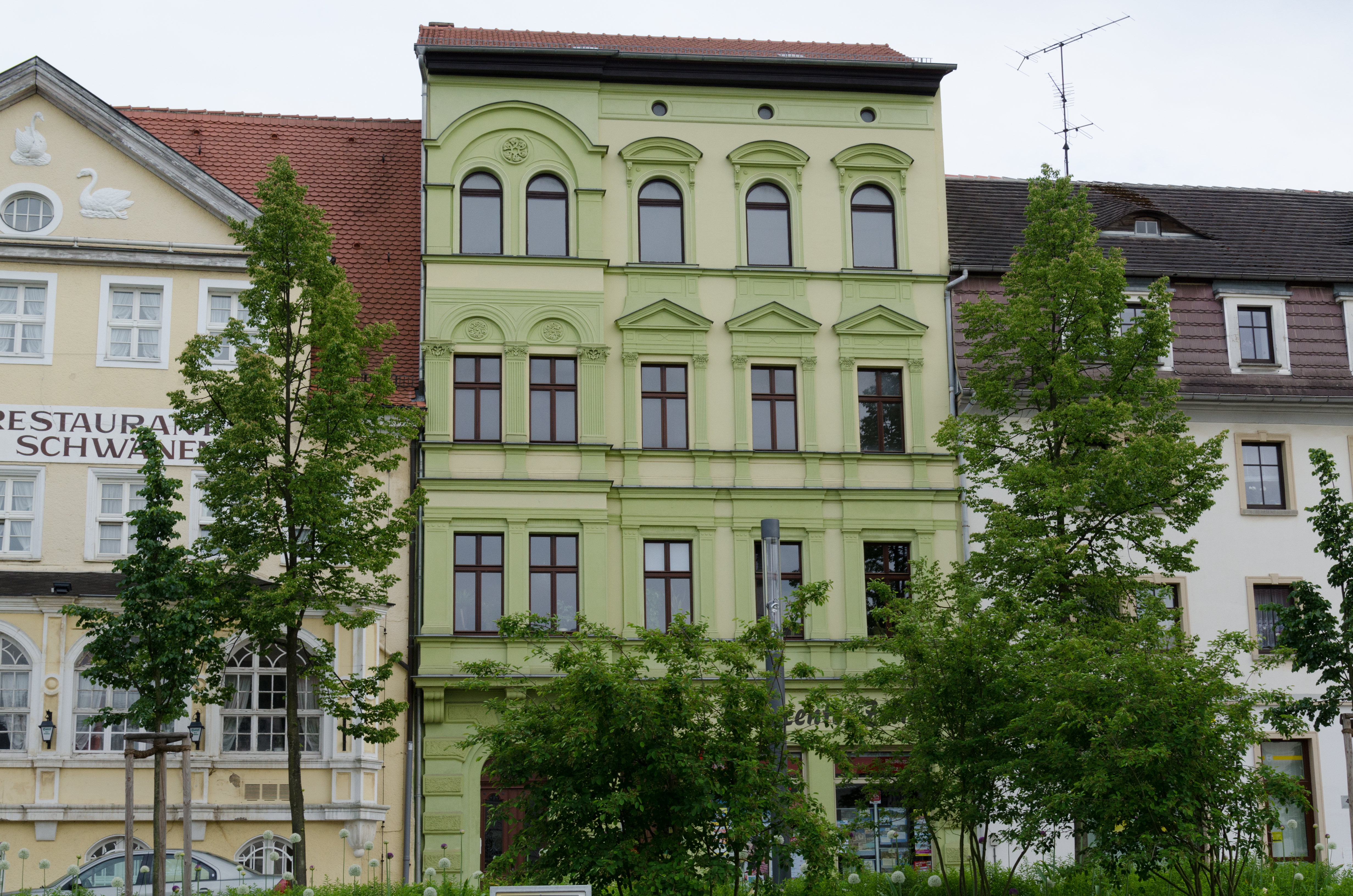 Zeitz, Altmarkt 5